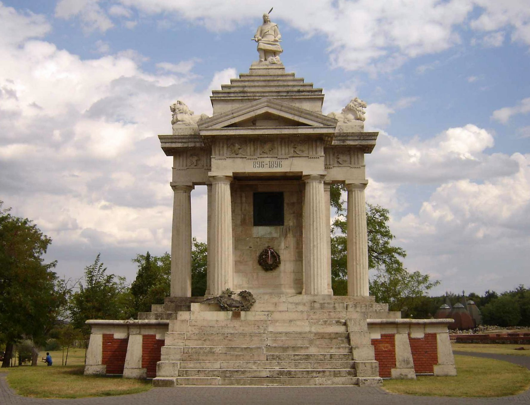 Árpád-emlékmű, Ópusztaszer, 1896